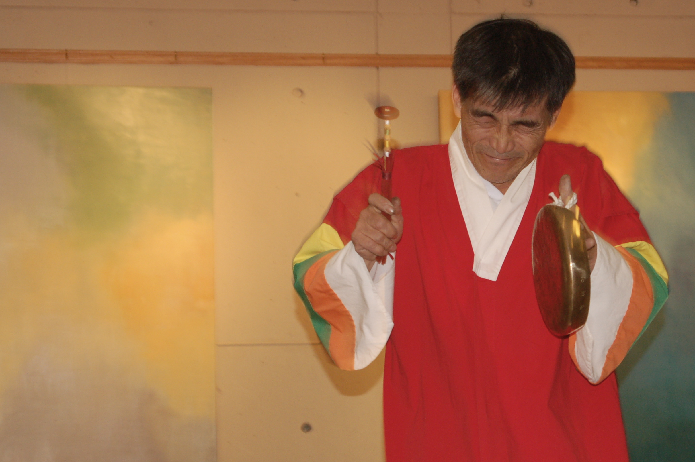 Ggaenggwari(꽹과리), Korean musical instrument.